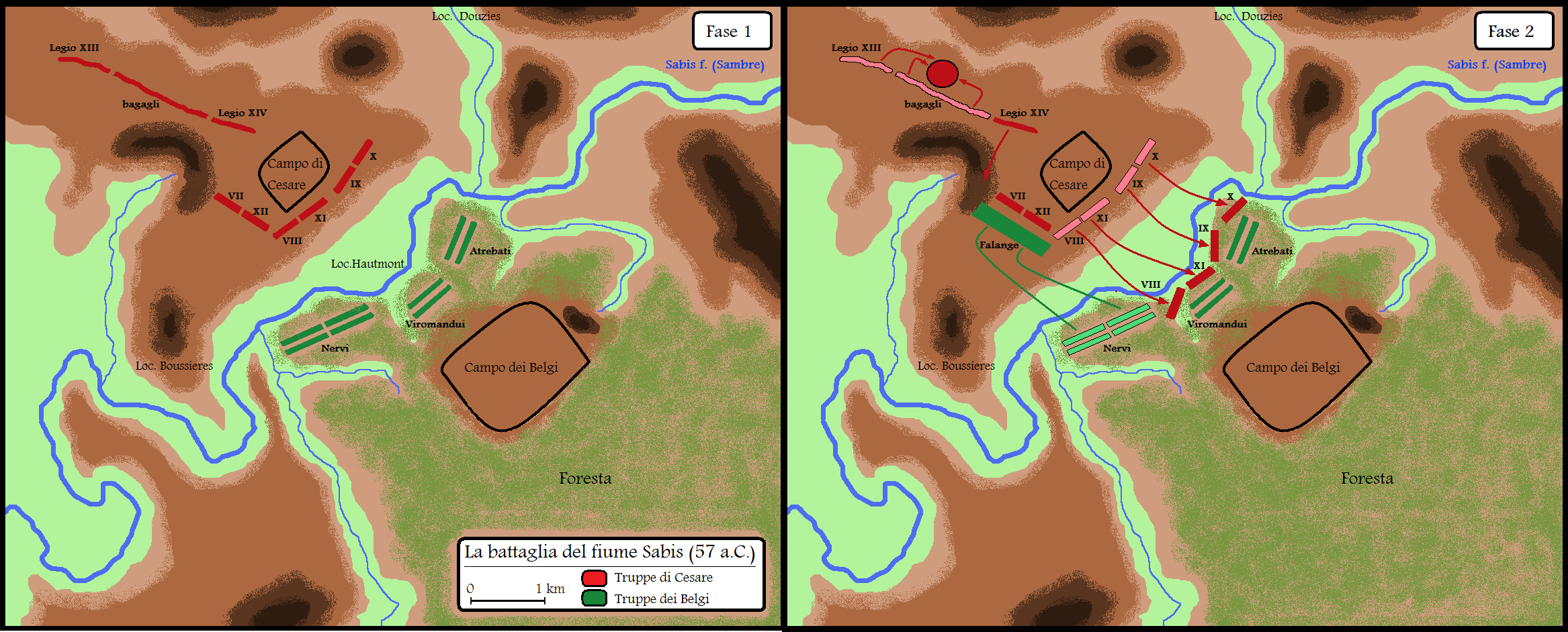 La battaglia tra Cesare ed i Belgi del fiume Sabis del 57 a.C.